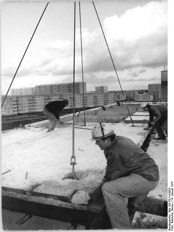 Neubrandenburg, Bauarbeiter Fertigteile montierend ADN-ZB Bartocha 14.1.75 Neubrandenburg: Einen gelungenen Planstart auf der Großbaustelle Neubrandenburg-Ost vollzogen die Kollektive bei der weiteren Verwirklichung des Wohnungsbauprogramms. Schichtleiter Hans-Joachim Timm (vorn) und Bernd Tolzin von der Jugendtaktstraße III sind stolz auf den Namen "Neubrandenburger Slobins", den Ihnen Kollegen achtungsvoll für die erfolgreiche Anwendung der Slobin-Mehtode verliehen. Nach dieser bewährten Technologie montierten die Bauerbeiter im vergangen Jahr 40 Wohnungen zusätzlich im Gegenplan. Dabei senkten sie die Kosten je Wohnblock um durchschnittlich 9800 Mark und verbesserten die Qualitätsnote von 2, 2 auf 1, 67. Über 5000 Wohnungen wurden hier seit Baubeginn 1970 an die Werkstätigen der Bezirksstadt übergeben.